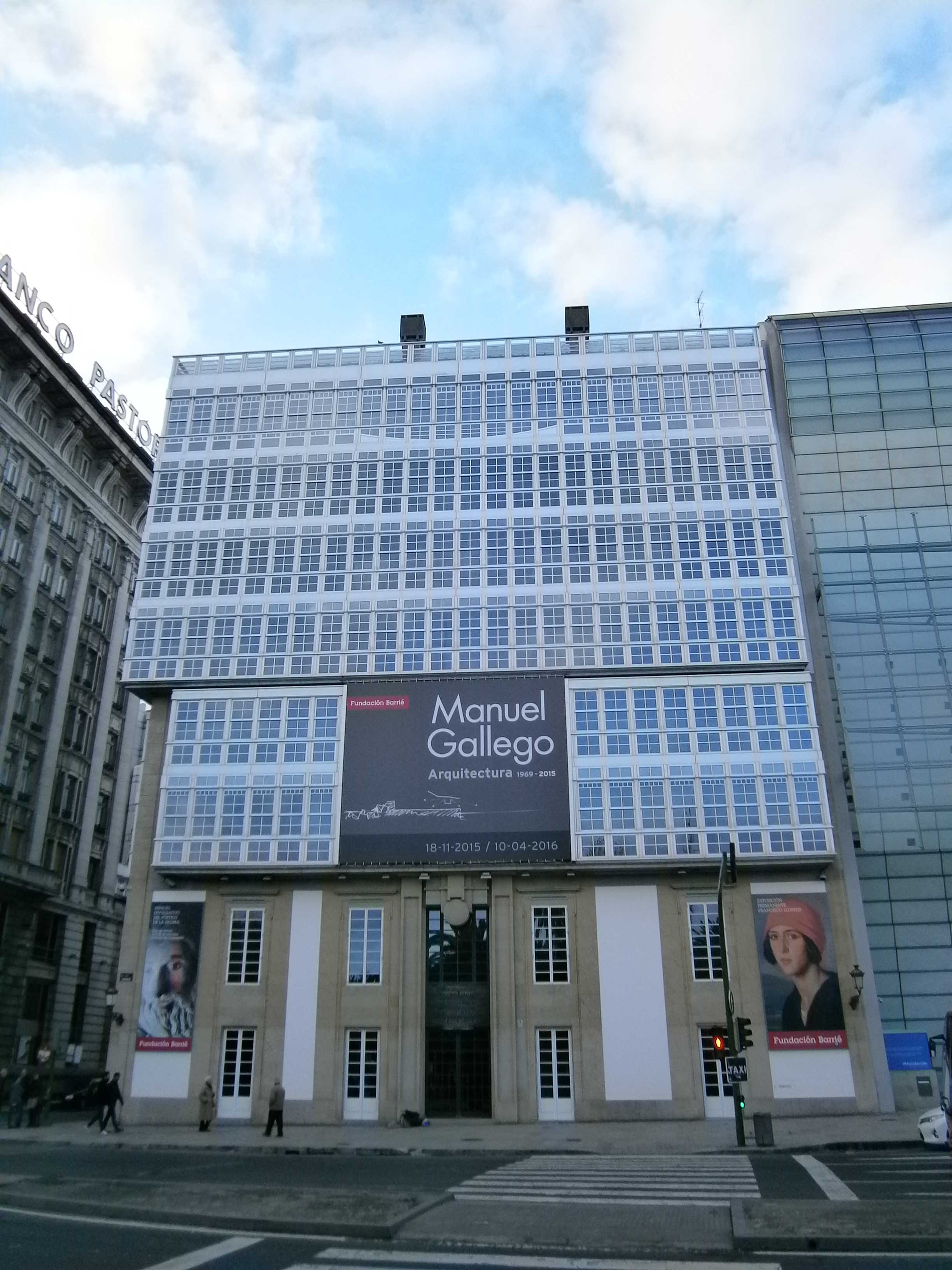 Sede da Fundación Barrié na Coruña